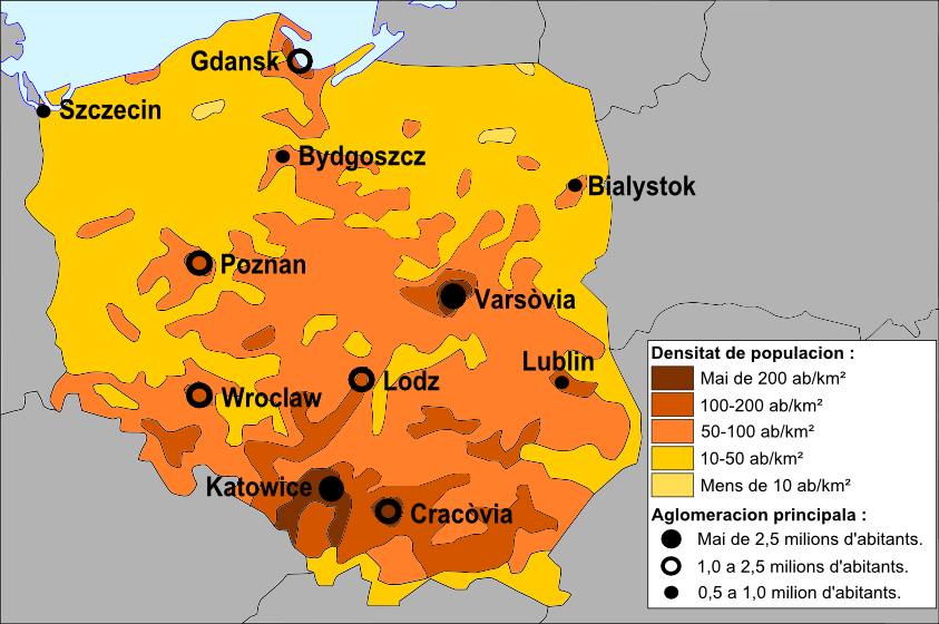 Densitat de populacion de Polonha.